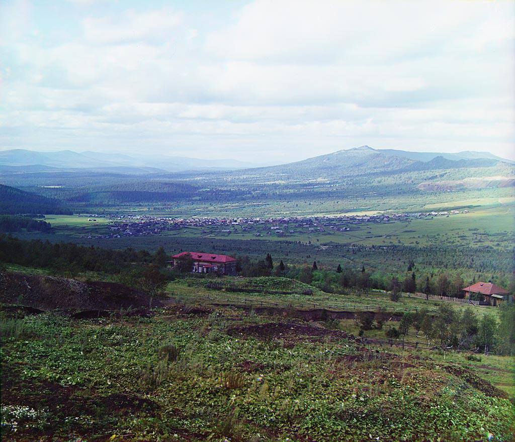 На снимке вид на посёлок Рудничный со склона горы Буландиха. В перспективе справа — хребет Шуйда.